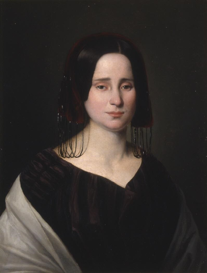 Retrato de la dama Manuela del Pilar Zoila Romea Yanguas (1824-1875), que fue la esposa del político conservador Cándido Nocedal y hermana del célebre actor Julián Romea.